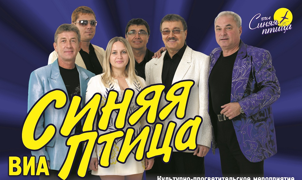 Виа "Синяя птица" 2015.